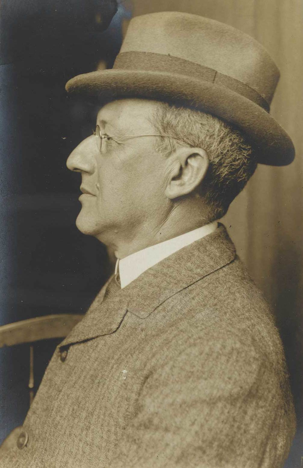 Henrique Bernadelli (Valparaíso, Chile, 15 de julio de 1857 - Río de Janeiro, 6 de abril de 1936) fue un pintor brasileño.